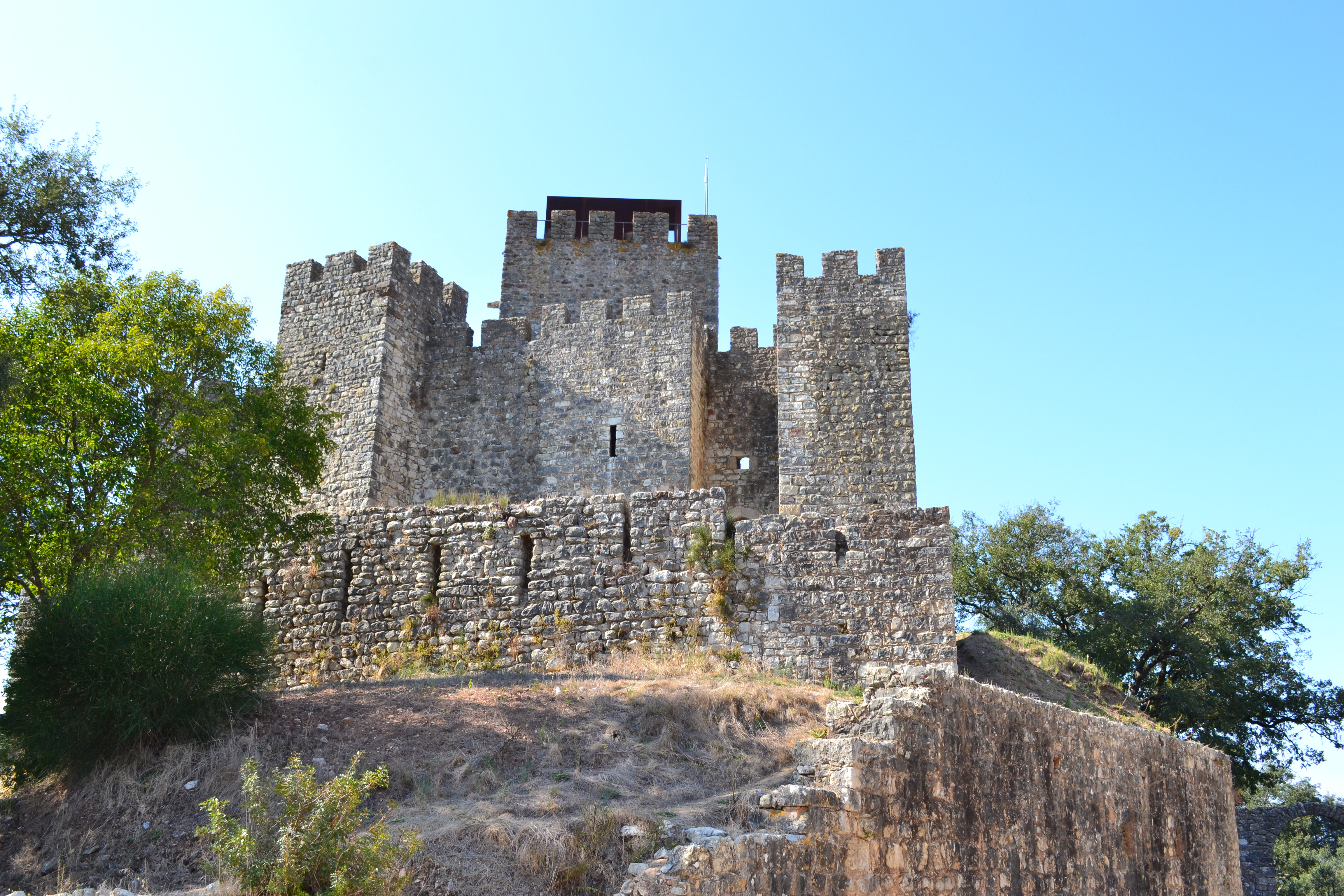 Castelo de Pombal This file was uploaded for Wiki Loves Monuments in Portugal with the unique identifier 71165.